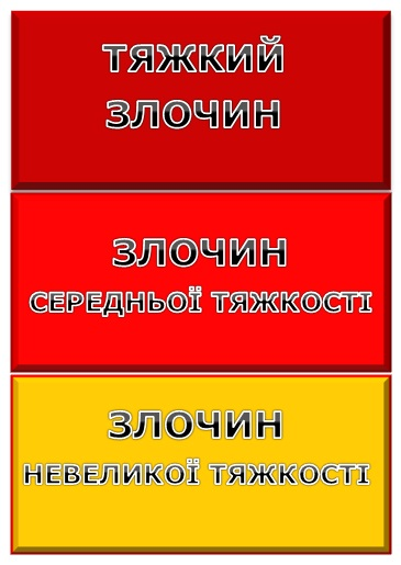 Класифікація злочинів